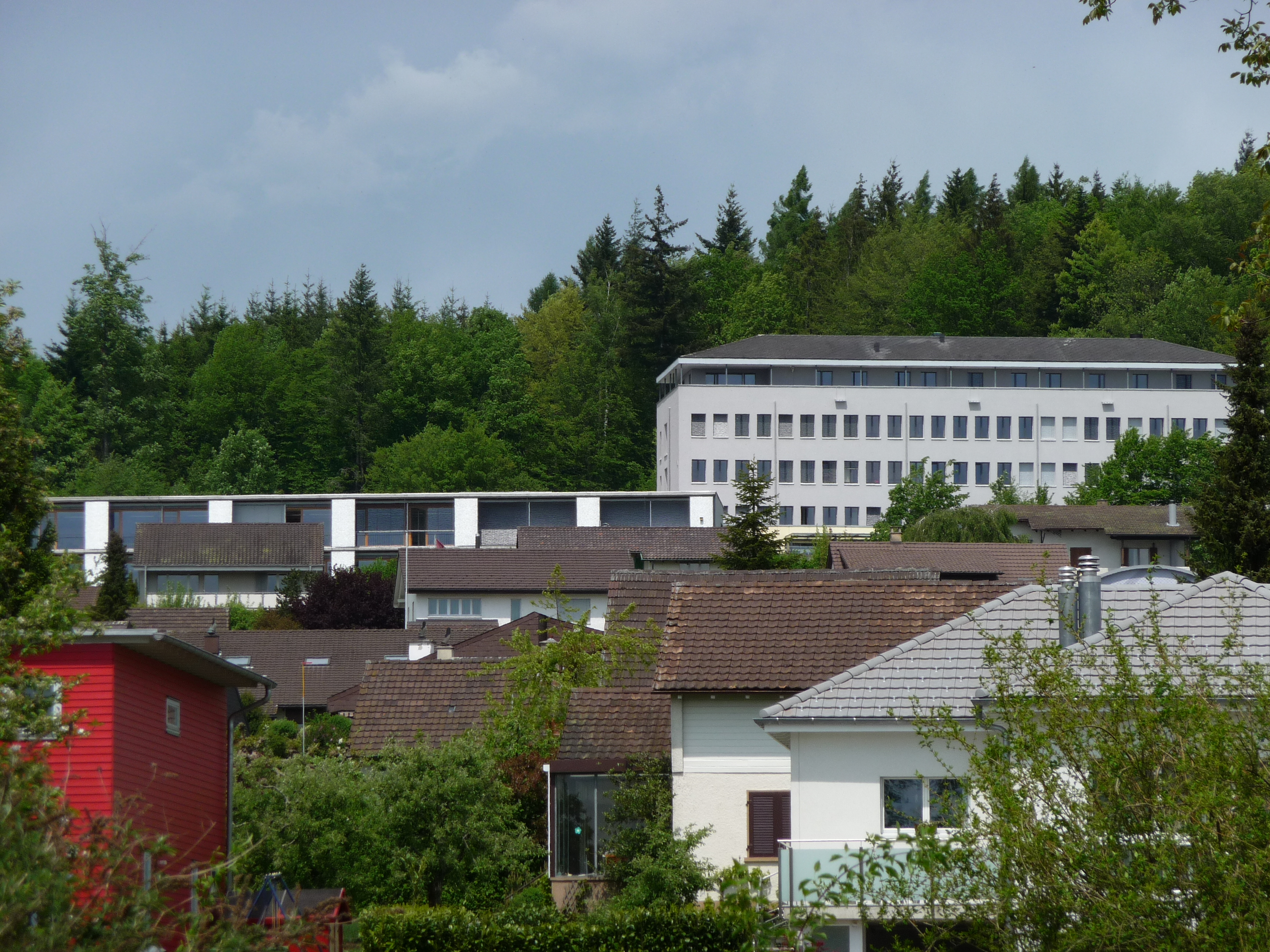 Schweizerisches Zentrum und Schule für Schwerhörige Landenhof